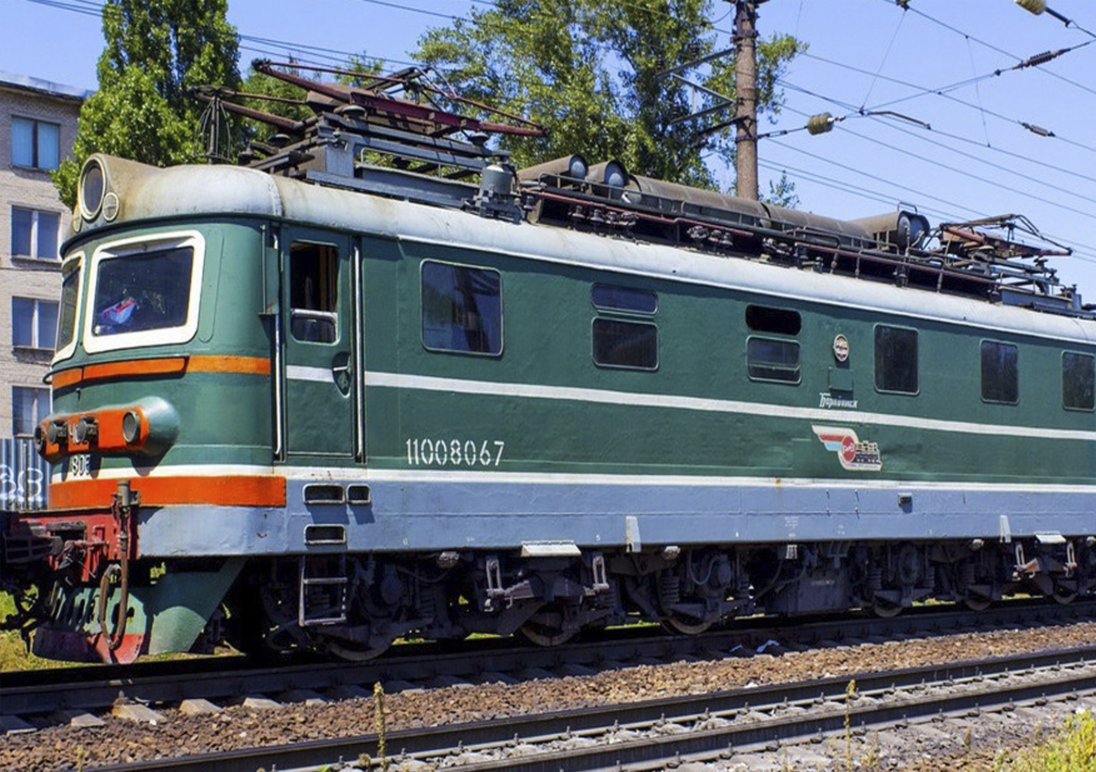 Построен на заводе «ШКОДА», Чехословакия в 1968 году